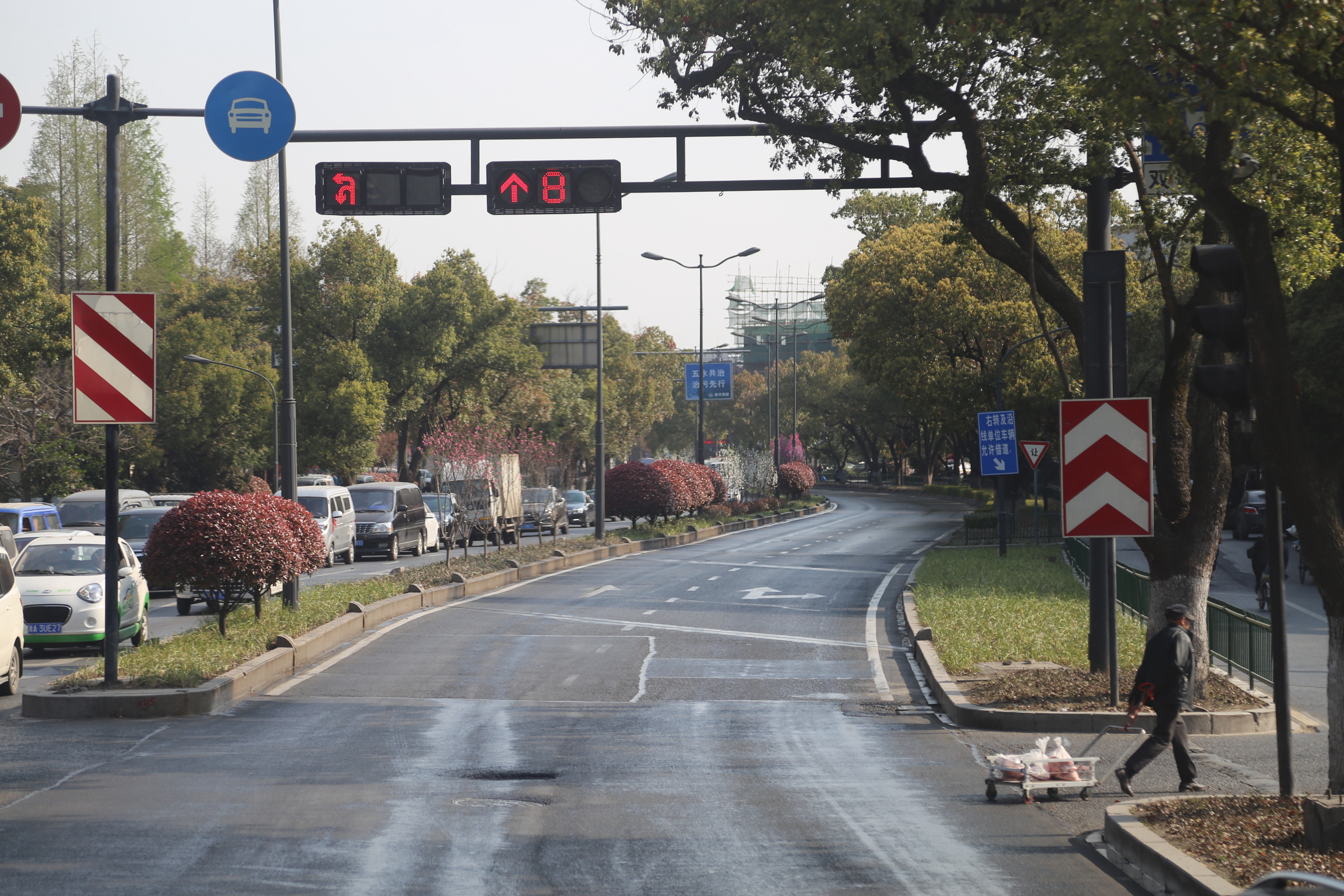 杭州机场路靠近笕桥机场路段上